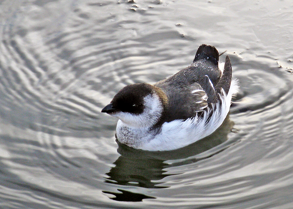 Alkekung - Alle alle. Småbåtshamnen Ystad.